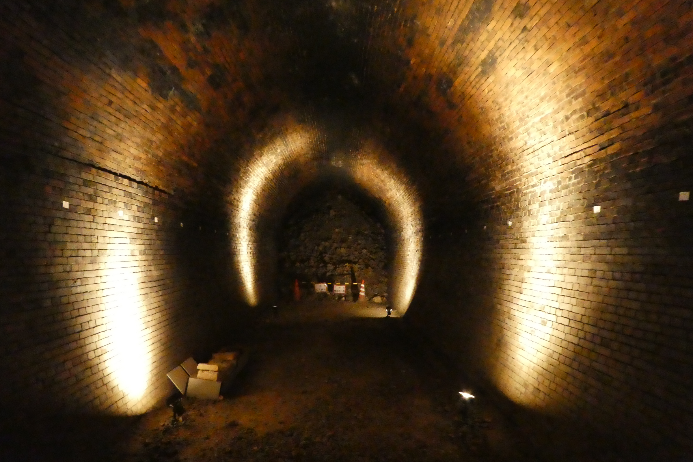 2008年に発見された旧大阪鉄道が建設した亀瀬隧道の内部